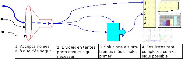 Quatre passos a seguir segons el Discurs del Mètode de Descartes